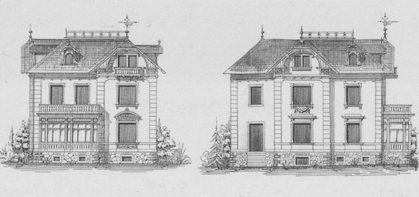 Radebeul, Villa Trauteck, Bauzeichnung 1900